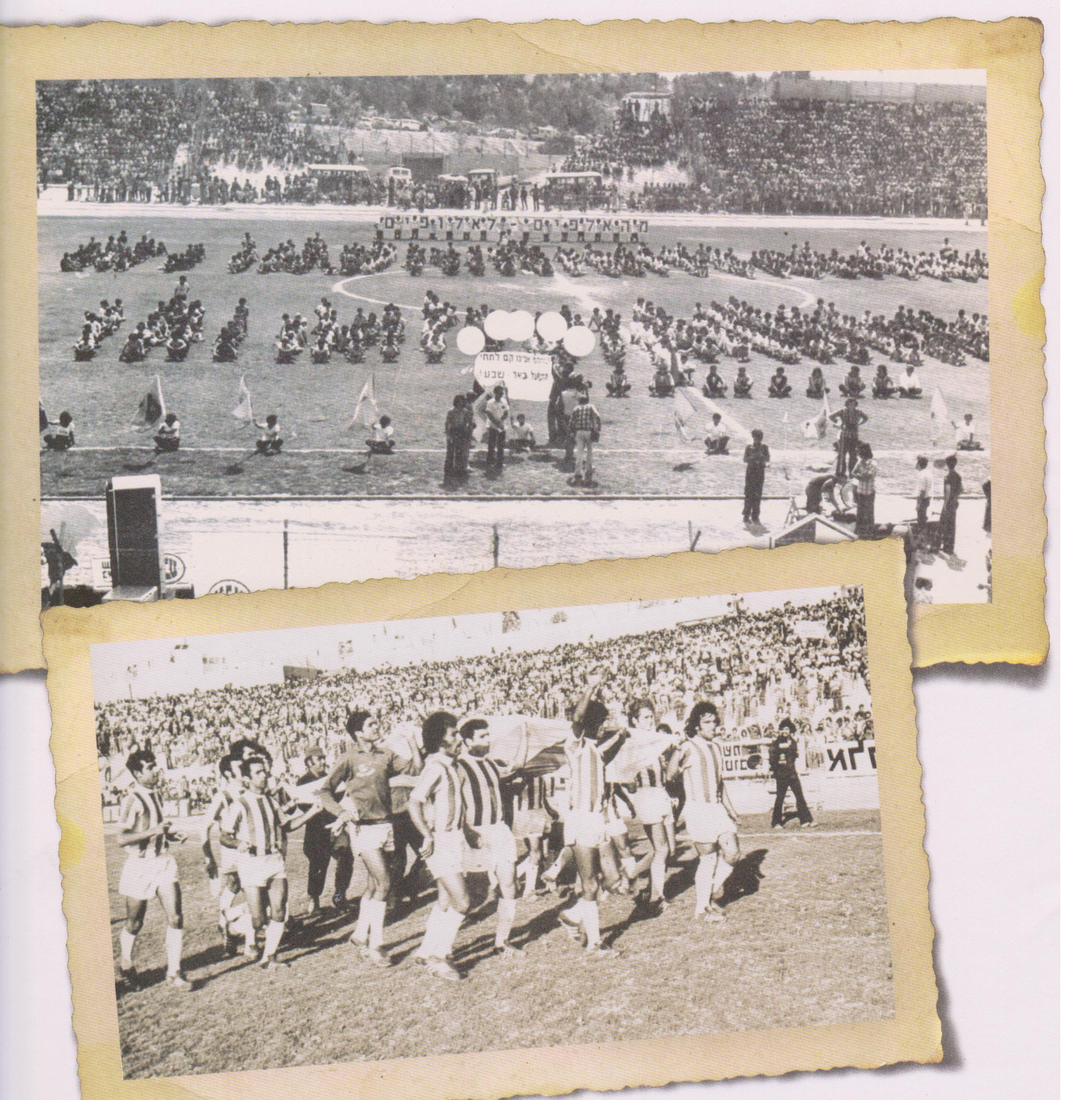 חגיגות האליפות הראשונה